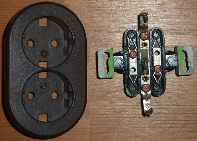 Einzelteile einer Doppel-Steckdose (mit beschädigtem Rand)